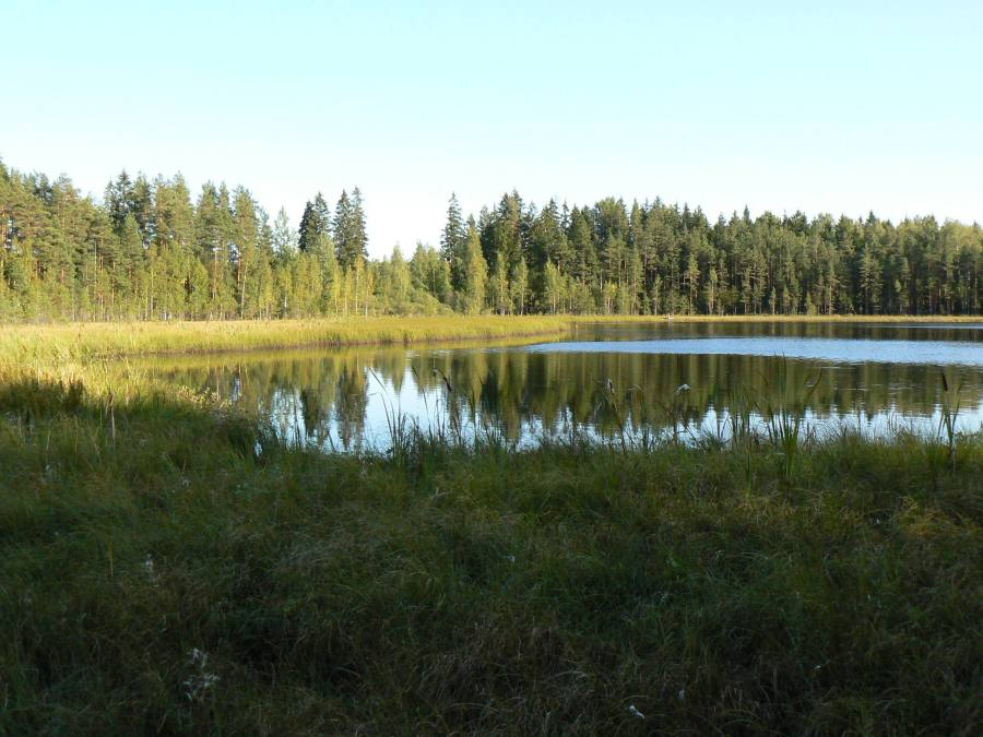 Kõta järv